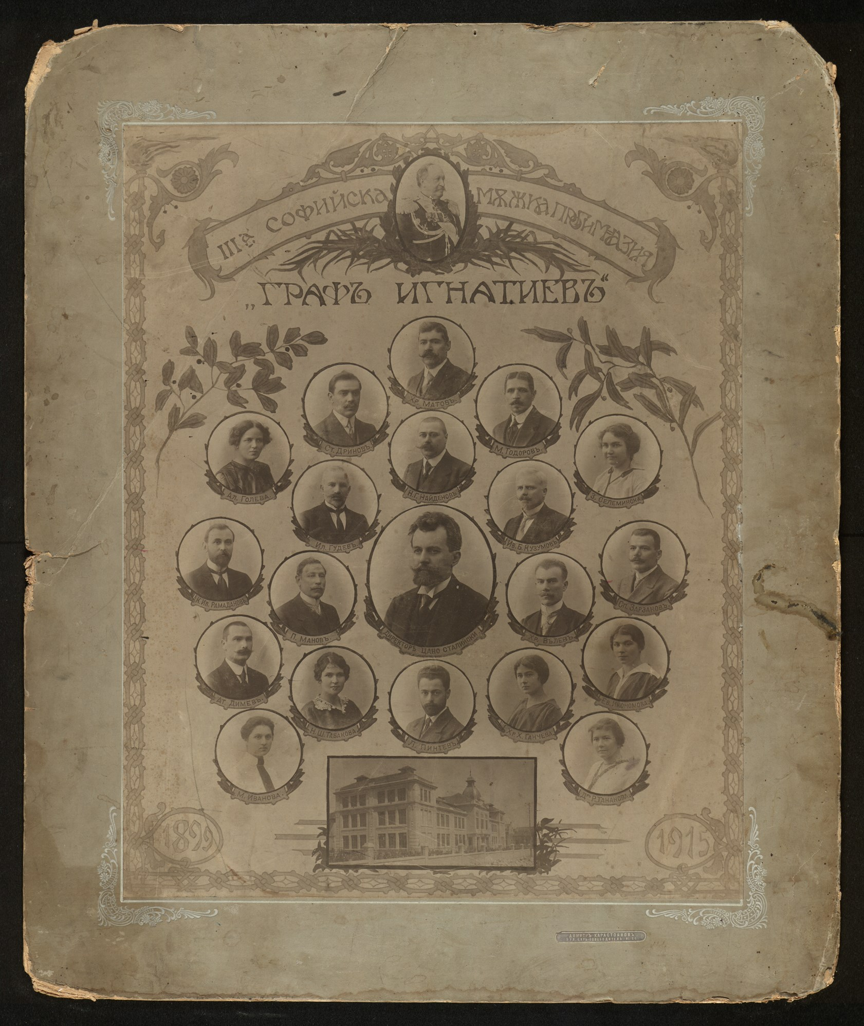 Снимка на ІІІ софийска мъжка прогимназия, изработена от фотоателие "Димитър Карастоянов" - София.